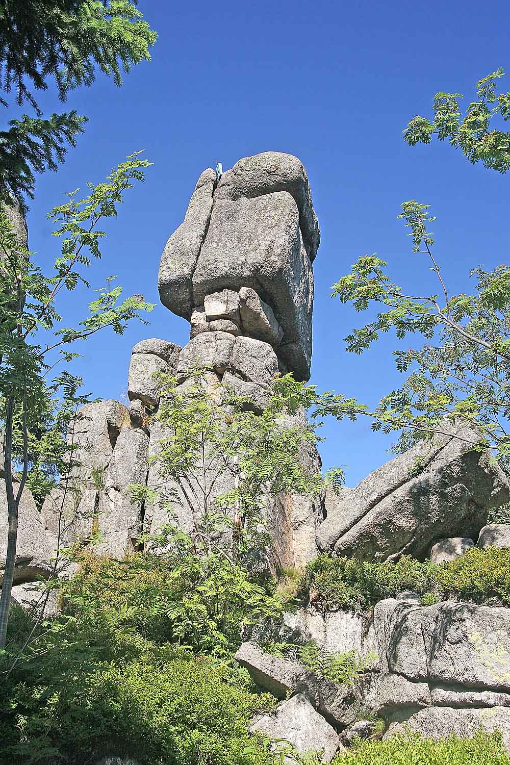 Jizerské hory - Sněžné věžičky, Jizera Mountains, district Liberec, Czech Republic autor: Prazak date: 19. 7. 2006